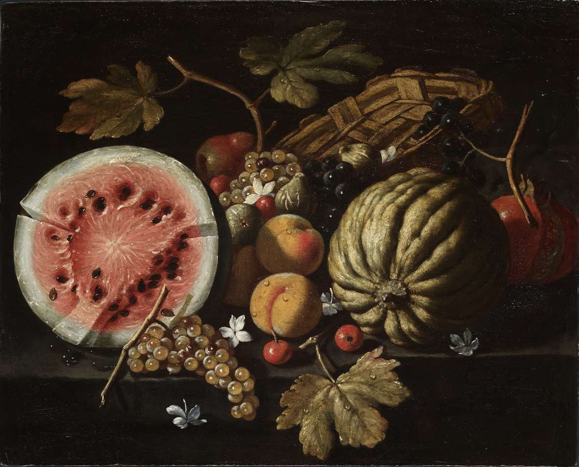 Ruoppolo Anguria, melone, fichi, pesche e uva sopra un basamento di pietra